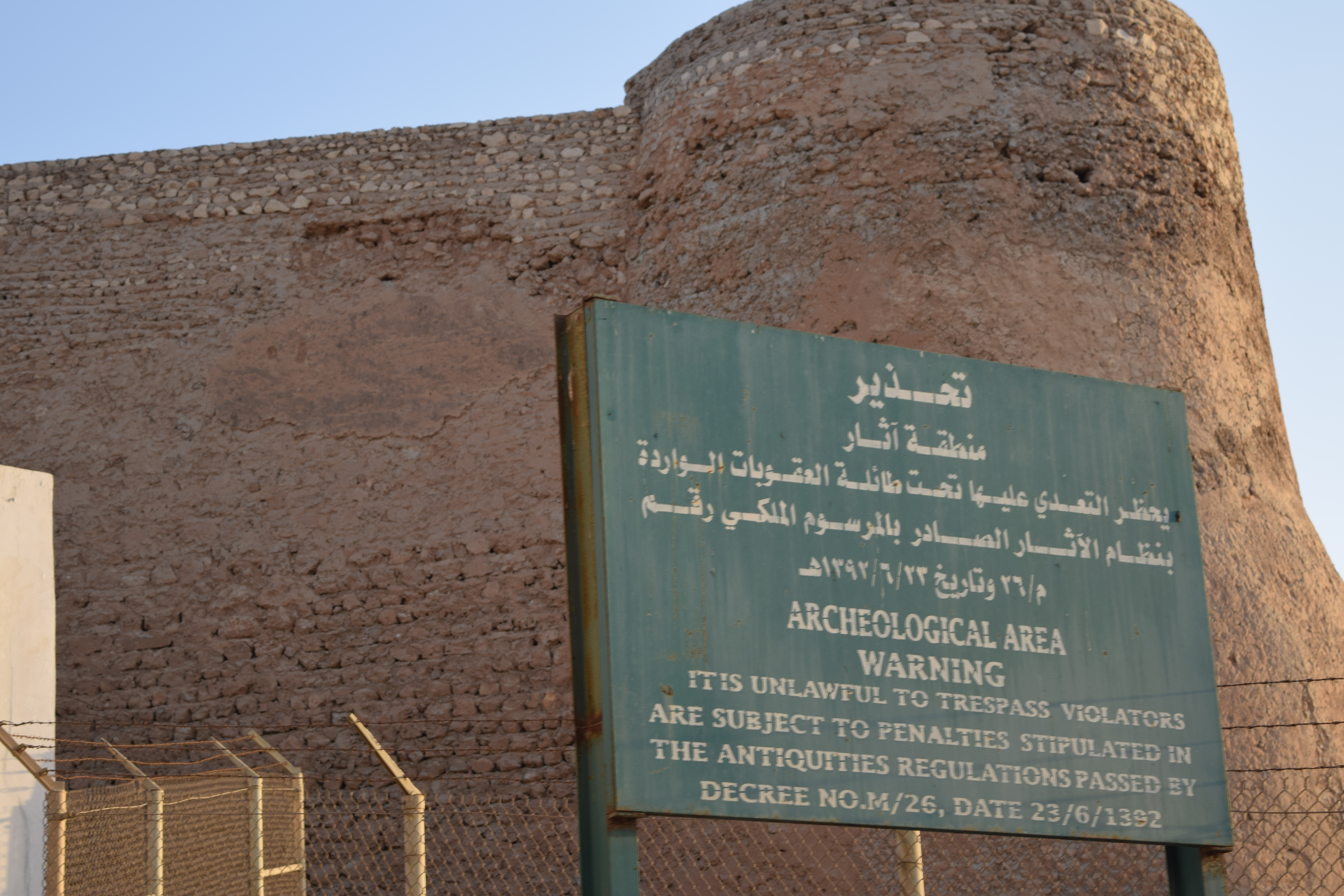 لوحة تحذيرية عن التعدي على قلعة تاروت وآثارها